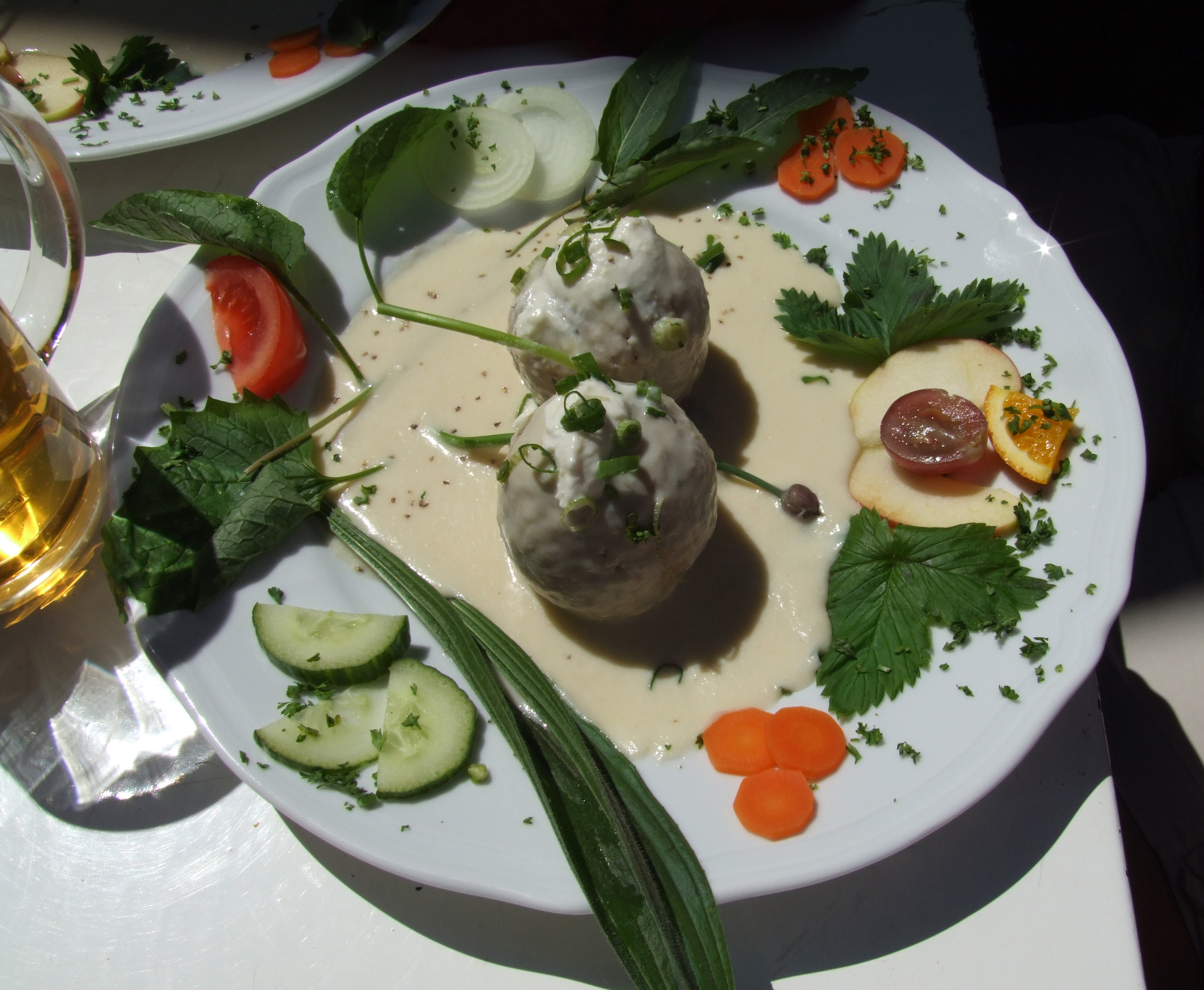 Fleischklöße mit Meerettichsoße, ein typisches Gericht der Pfälzer Küche. Pälzisch: Fläschknepp mit Meerrettichsoß.